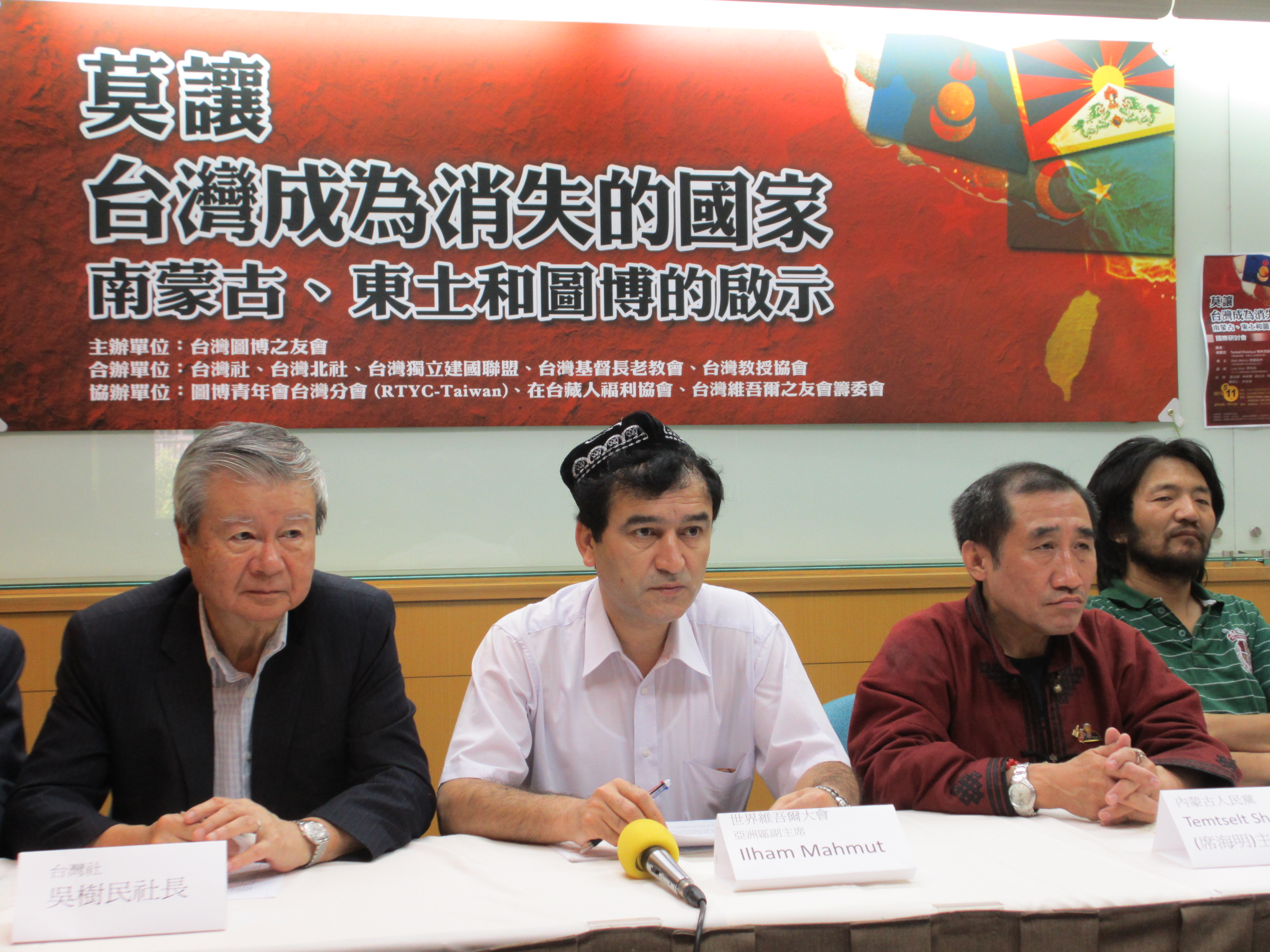 中文（台灣）: 台灣圖博之友會主辦，台灣社、台灣北社、台灣獨立建國聯盟、台灣基督長老教會、台灣教授協會合辦，圖博青年會台灣分會、在台藏人福利協會、台灣維吾爾之友會籌備委員會協辦「莫讓台灣成為消失的國家：南蒙古、東土和圖博的啟示」國際研討會會前記者會。左起：台灣社社長吳樹民、世界維吾爾代表大會日本代表依里哈木、內蒙古人民黨主席特木其勒圖、「9-10-3圖博前政治犯運動組織」李科先。